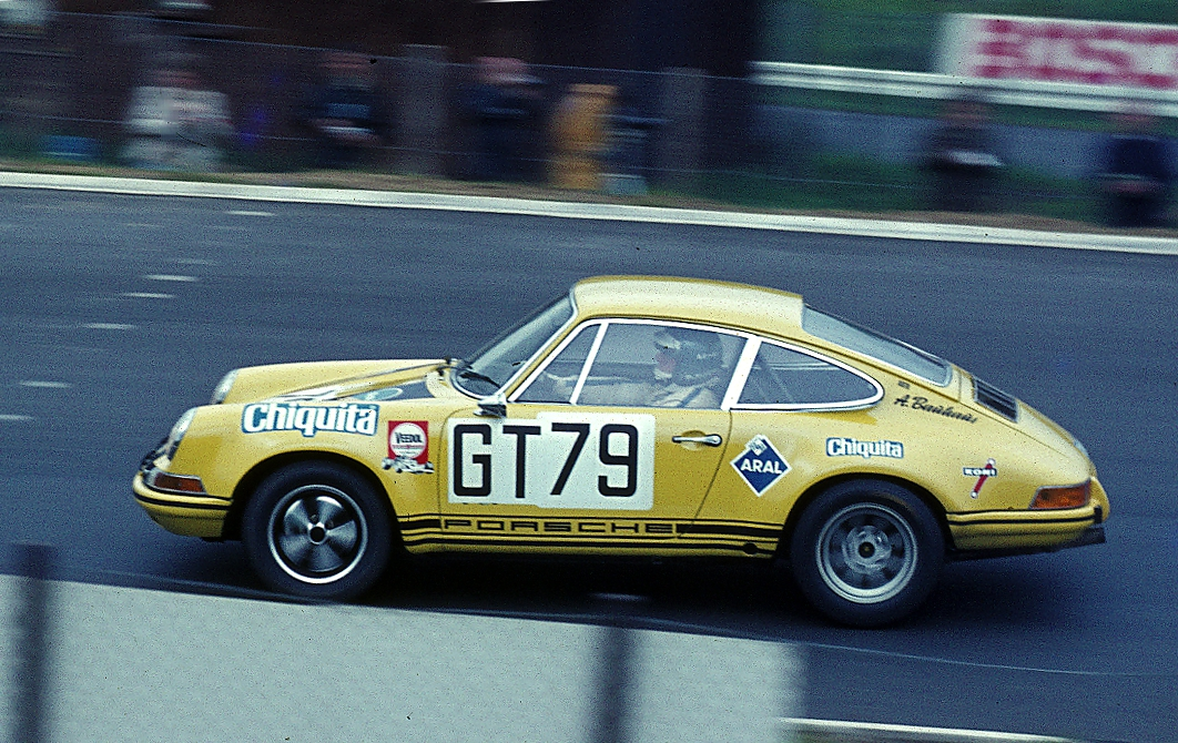 Porsche 911 S mit Dieter Fröhlich beim 1000-km-Rennen auf dem Nürburgring, eingangs Südkehre.